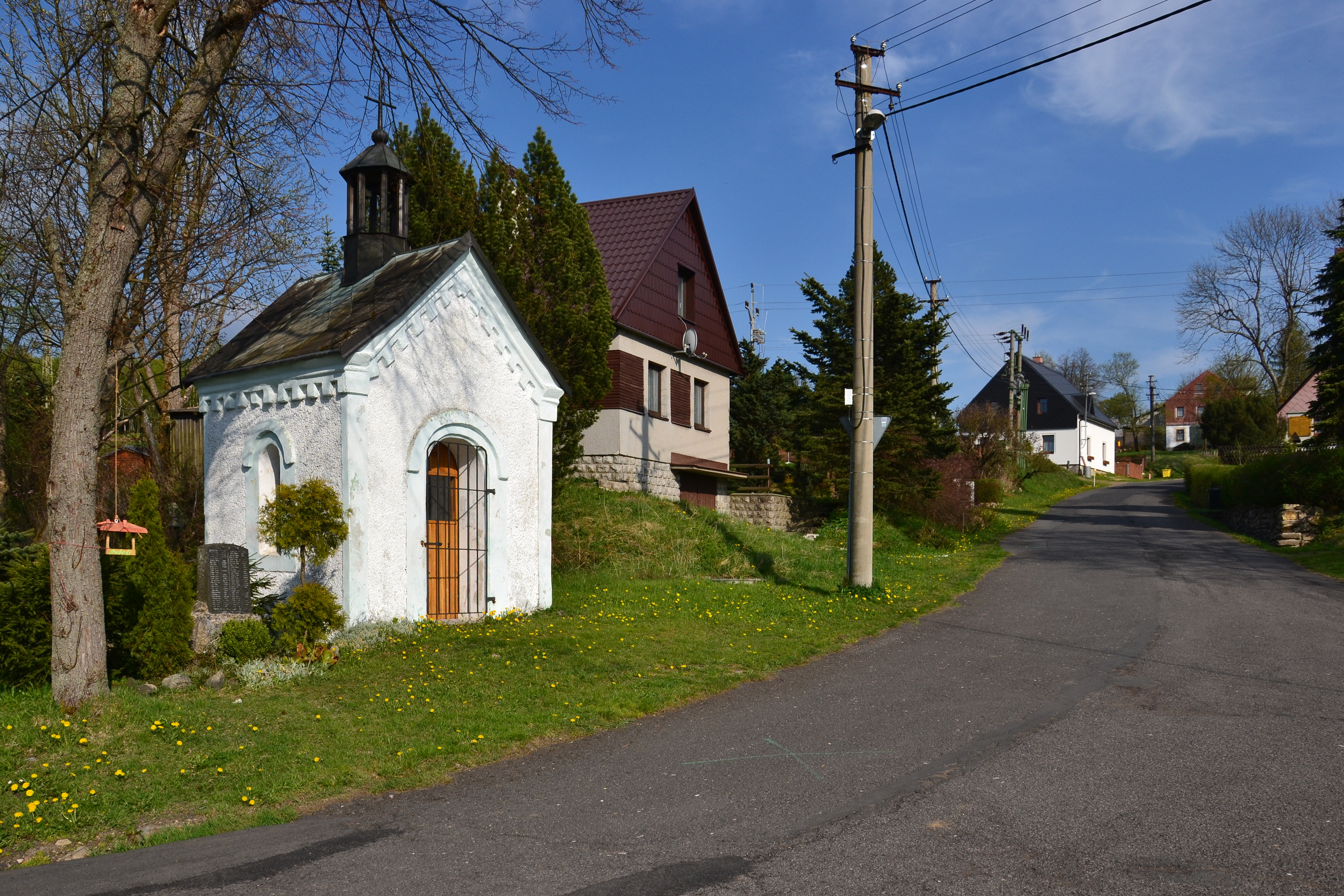 Načetínská kaple